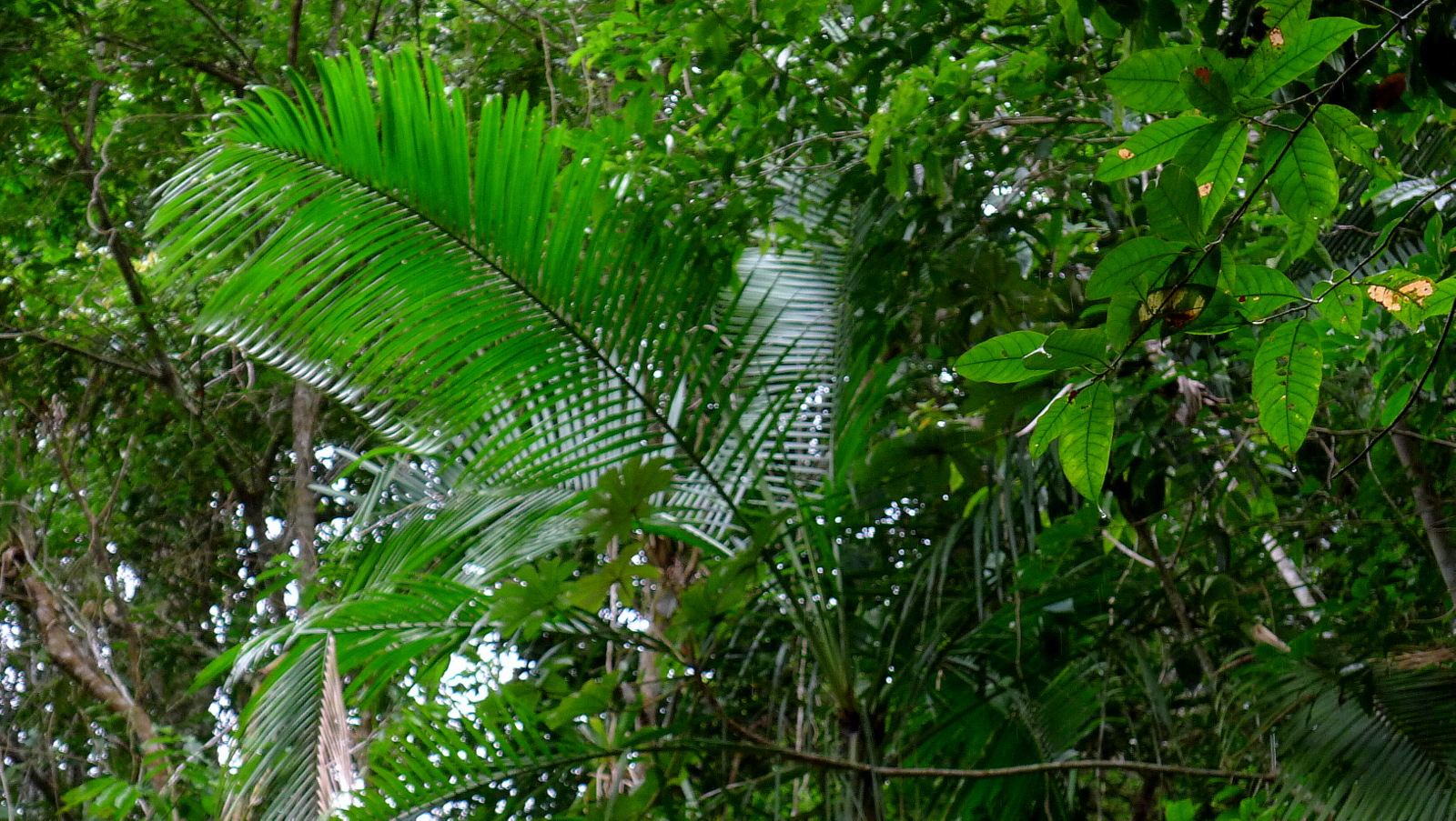 Euterpe edulis Mart.